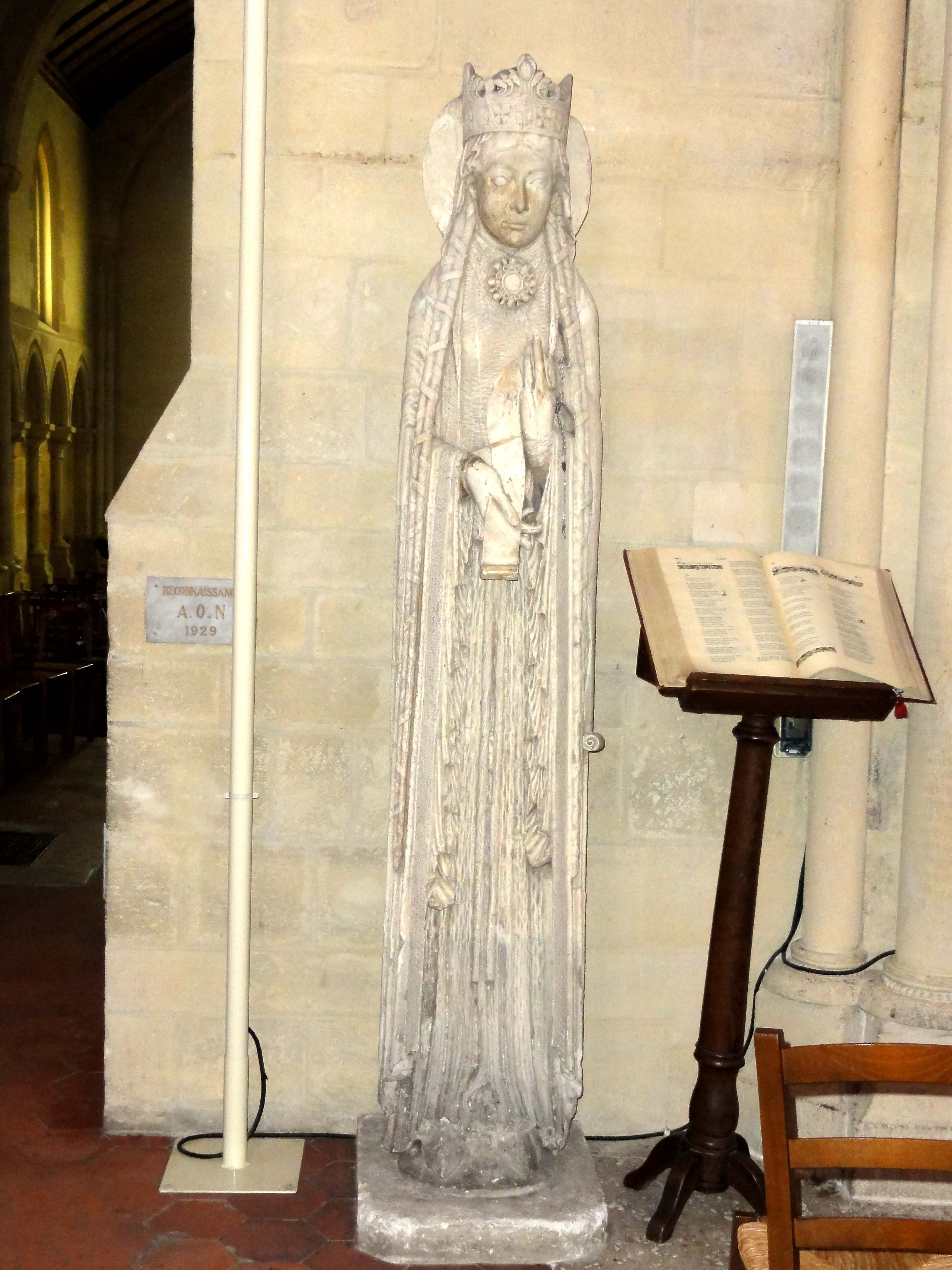 Intérieur de l'église (voir titre). Moulage en plâtre de la statue-colonne de la reine de Saba (précédemment identifiée à Clotilde[1]) provenant de l'église Notre-Dame de Corbeil à Pringy (détruite après la Révolution).